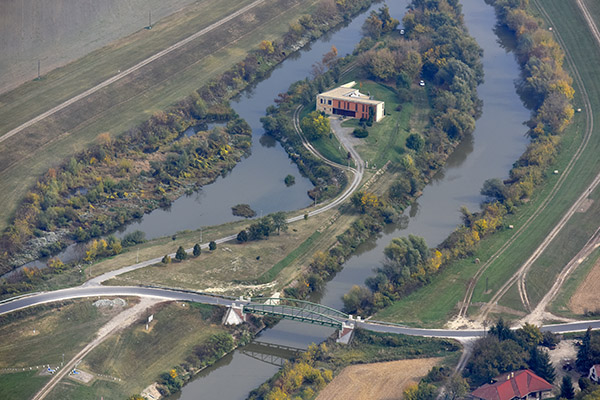 Híd Sióagárdnál - légi fotó